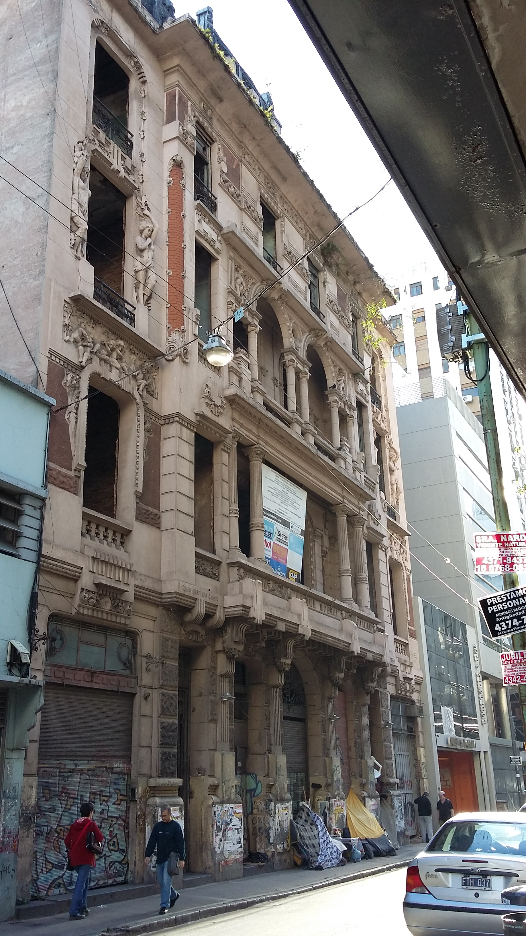 Salón Augusteo. Buenos Aires. Sarmiento 1374.